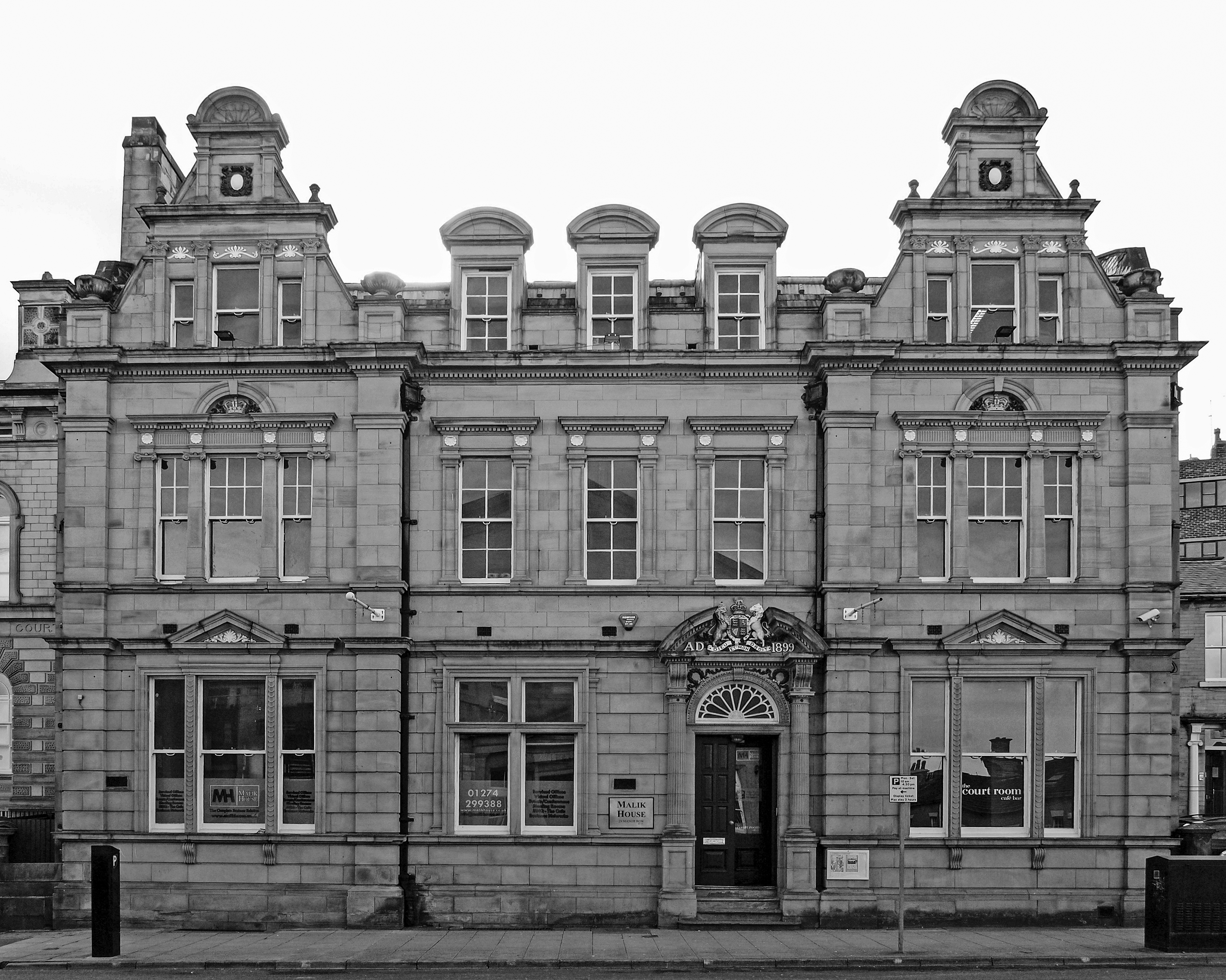 aka Malik House